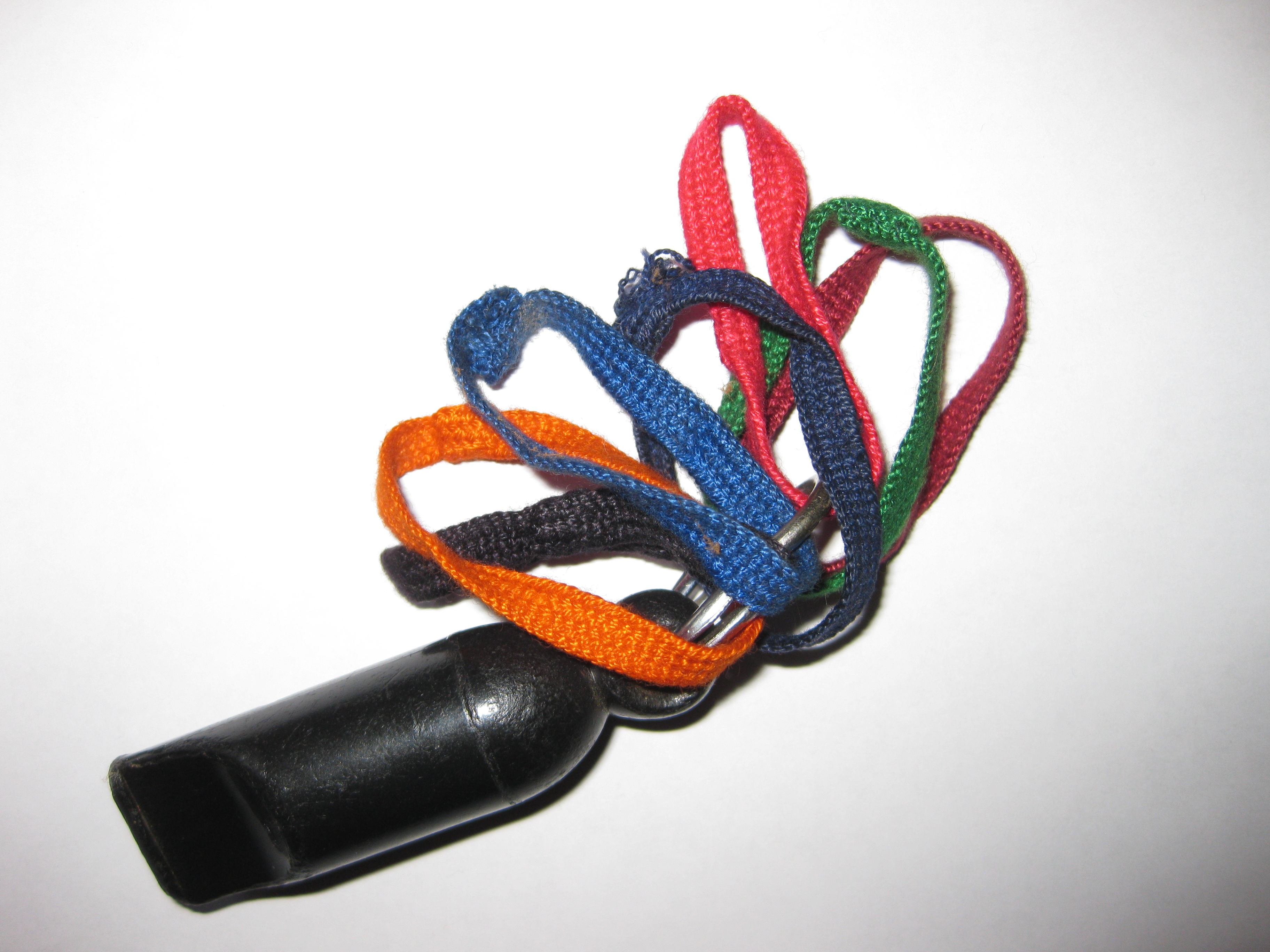 Diverse Litzen der dt. BW